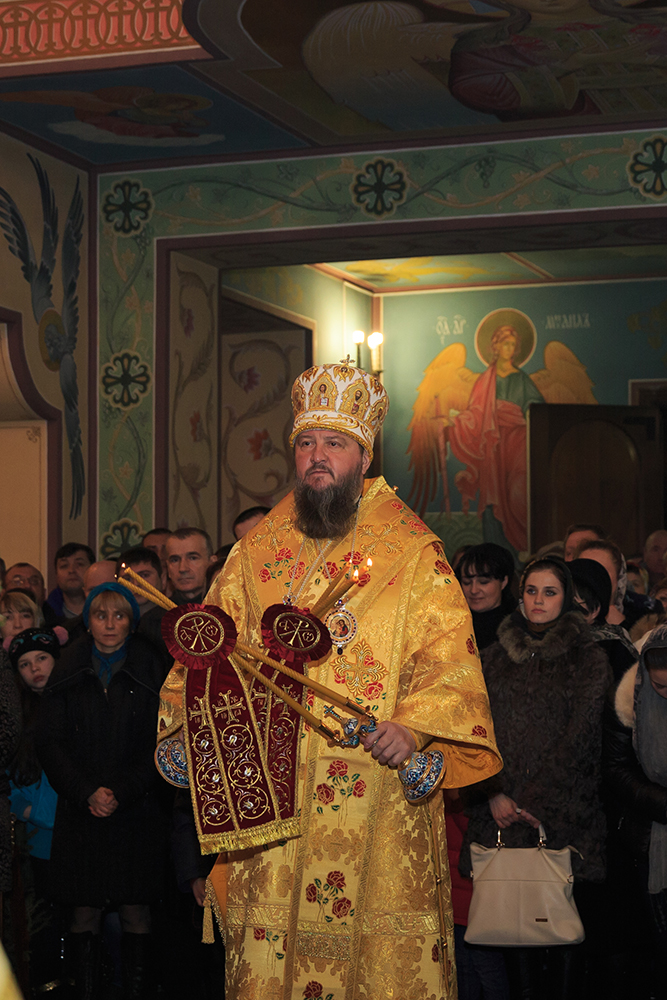 Архиепископ Тираспольский и Дубоссарский Савва (2014 год)